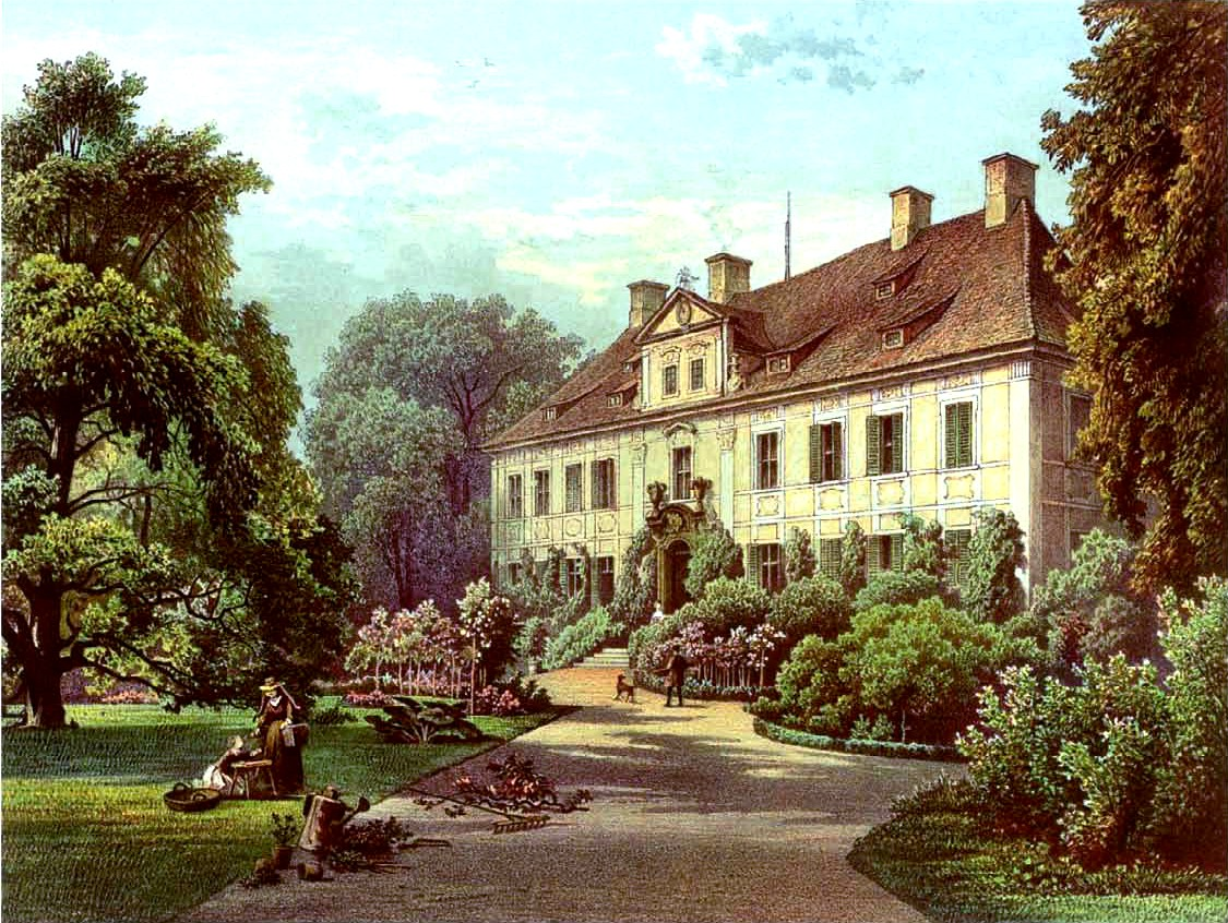 Schloss Pohlschildern, Kreis Liegnitz